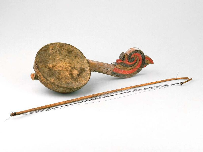 Strijkinstrument. Strijkluit met één snaar met strijkstok Unknown language: Arababu